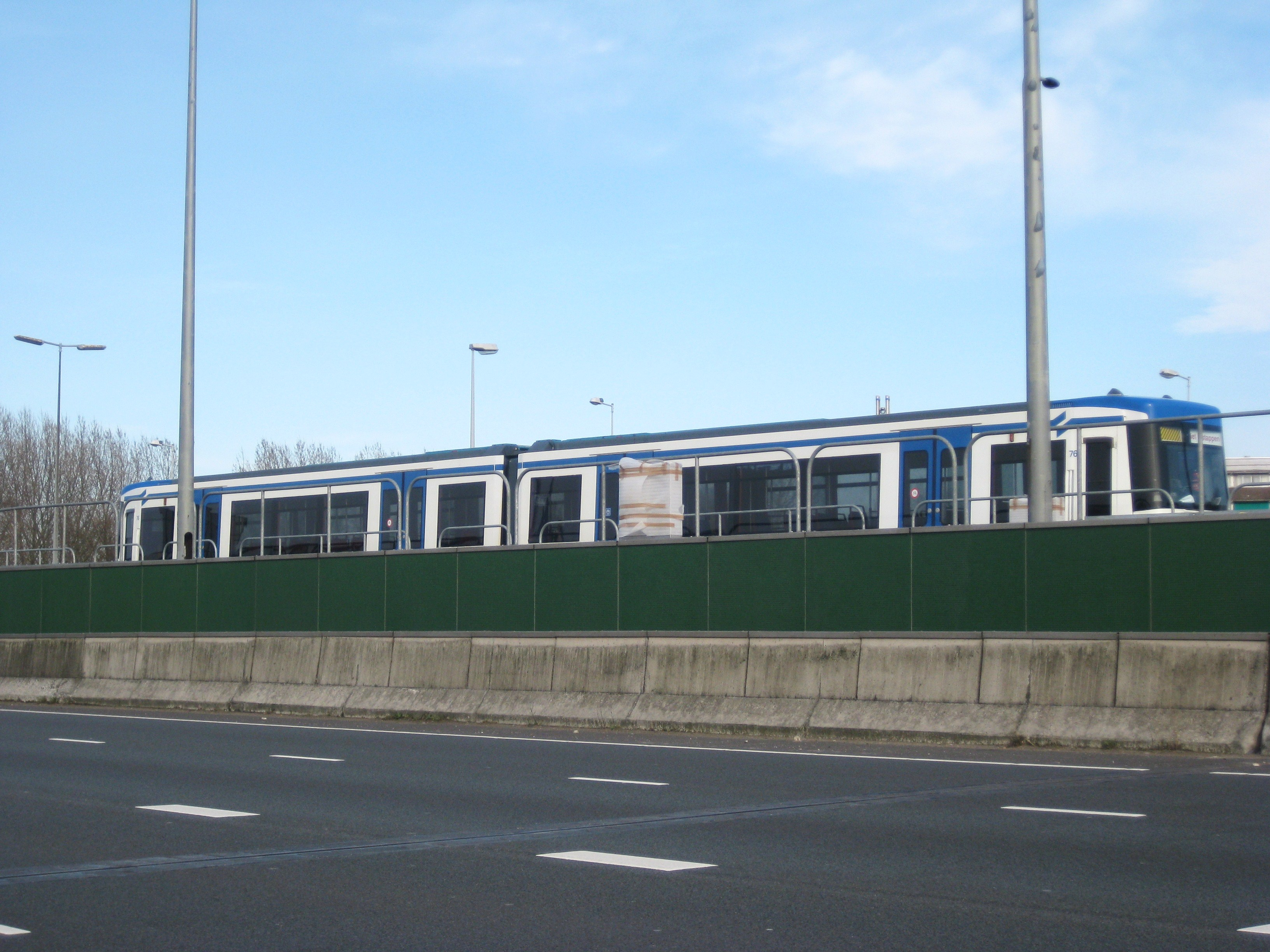 Metrostel M4-76 werd in de nacht van 10 op 11 april geplaatst op de rails van de Noord-Zuidlijn aan de Nieuwe Leeuwarderweg in Amsterdam-Noord in afwachting van de testen.